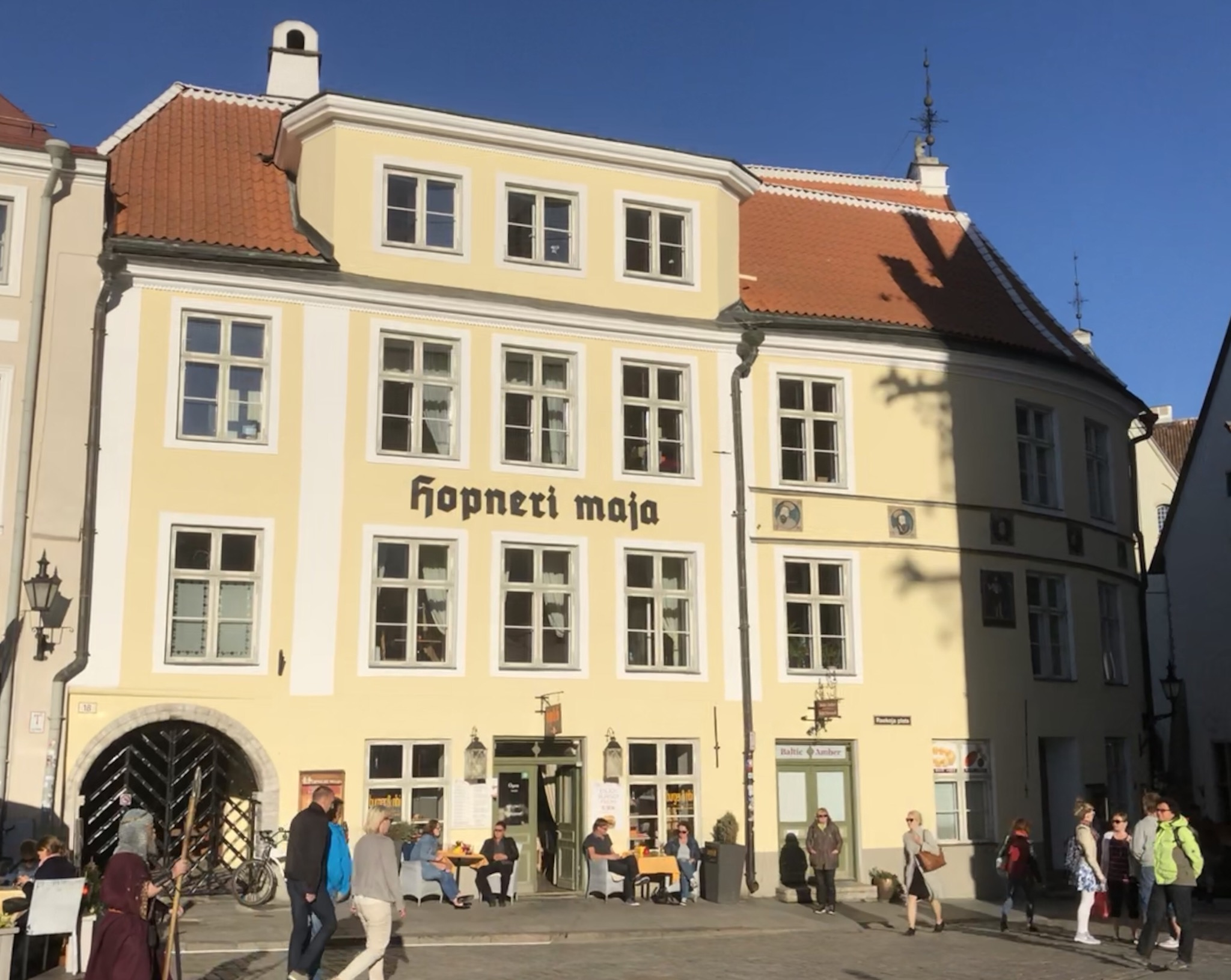 Höppner-Haus vom Rathausplatz aus im Jahr 2018